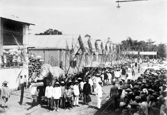 Repronegatief. Optocht tijdens opening campagne van de S.O. Kadipaten